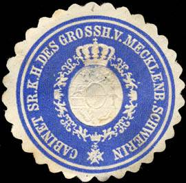 Sealing stamp Title: Cabinet Seiner Königlichen Hoheit des Grossherzogs von Mecklenburg Schwerin Description: blau, weiß, geprägt Place: Schwerin size: 4 cm